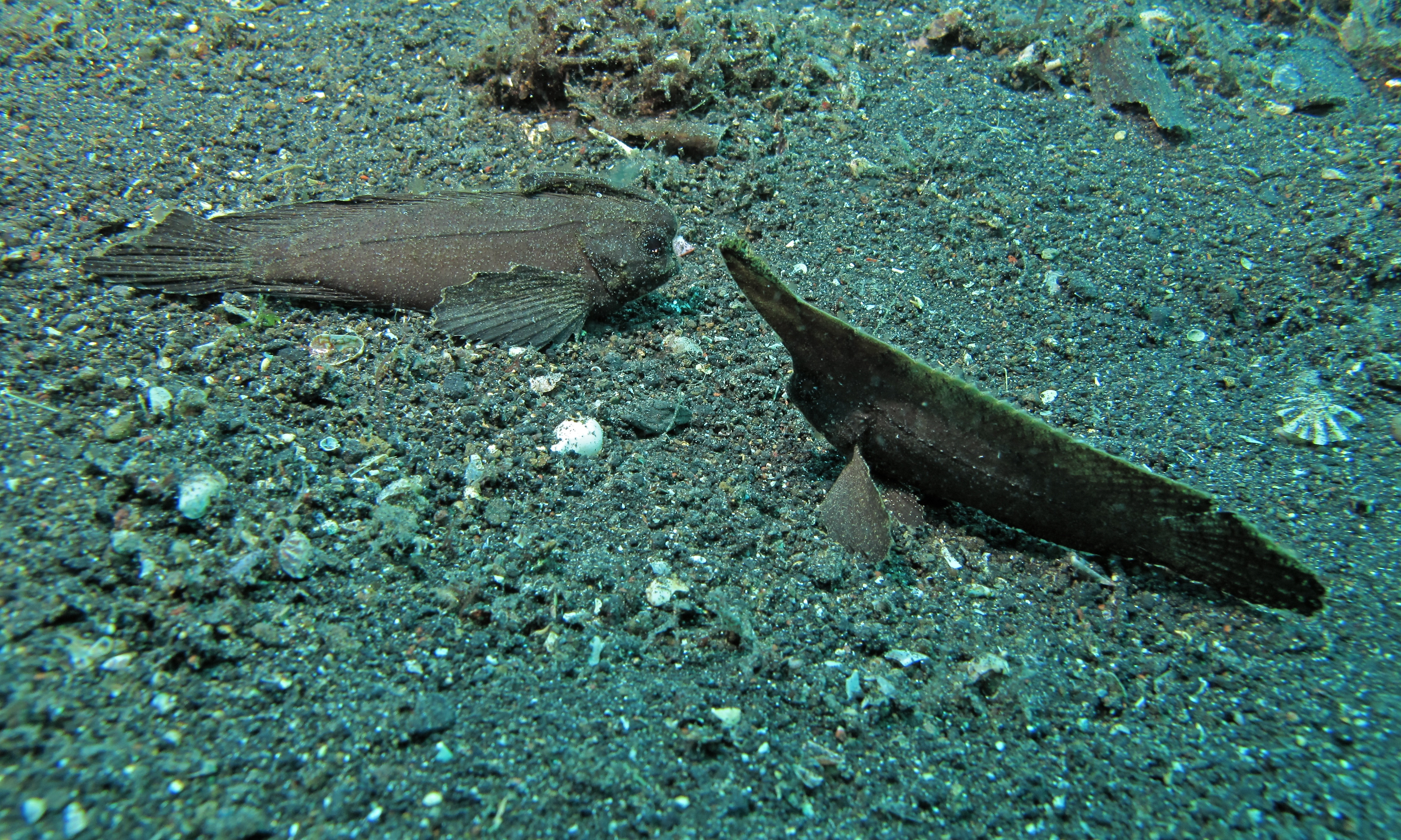 Hairball I, Lembeh Strait, Sulawesi, INDONESIA